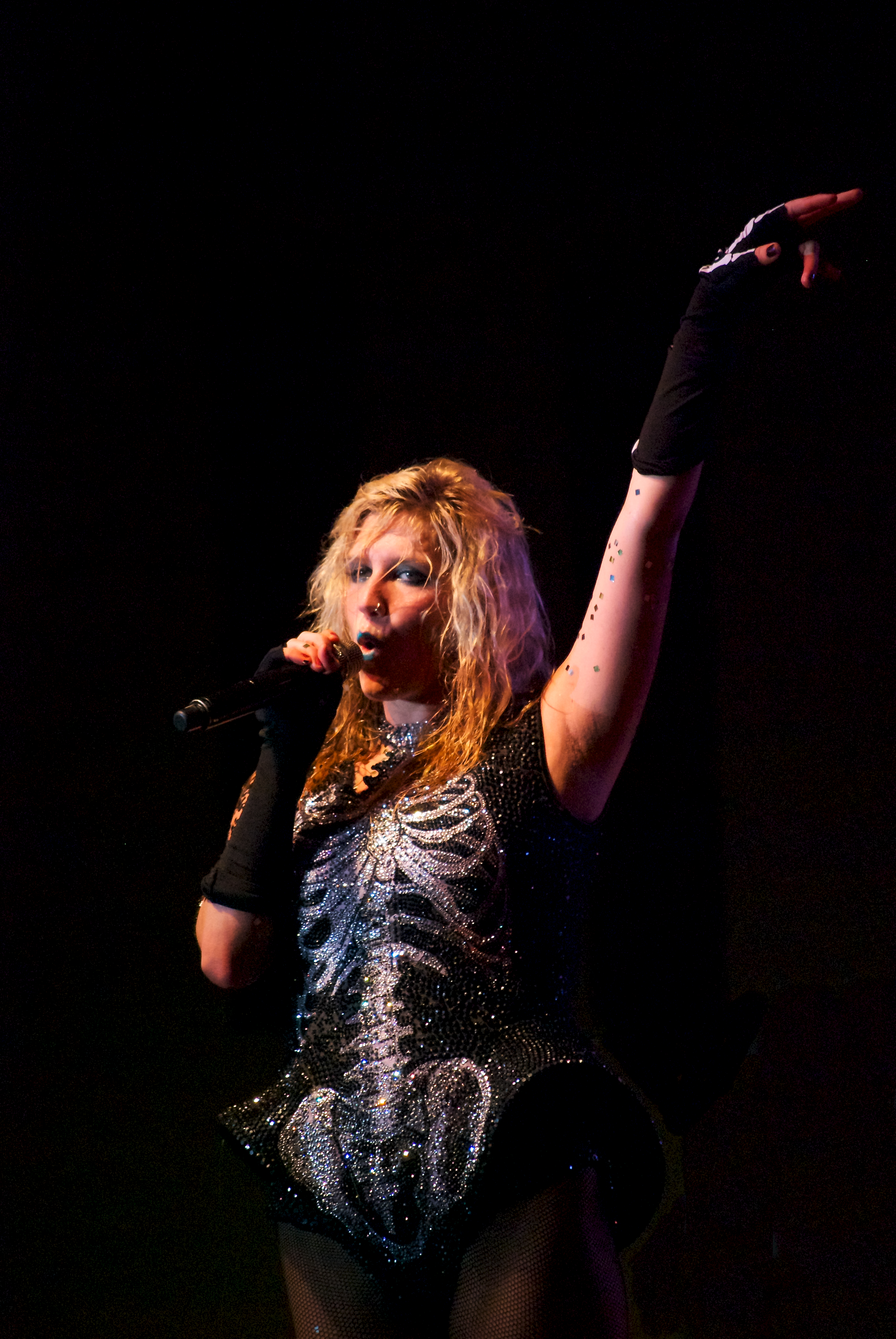 Ke$ha performing "Tik Tok" at SUNY